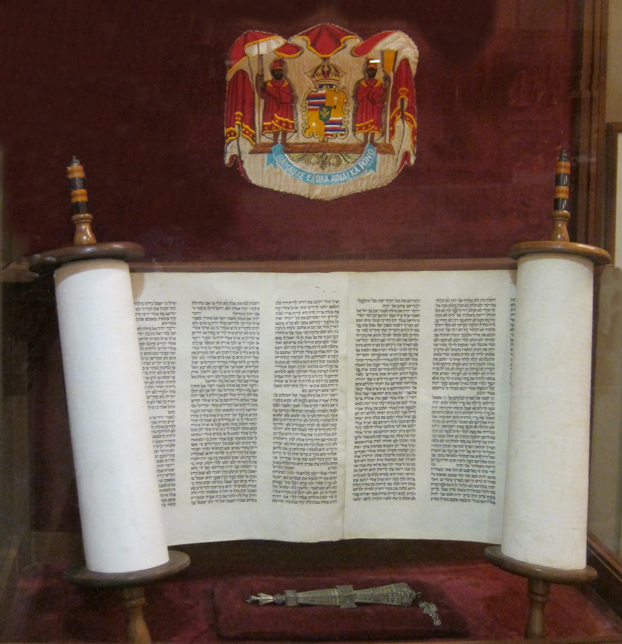 King Kalakaua's Torah and yad in display case at Temple Emanu-El, Honolulu, Hawaii